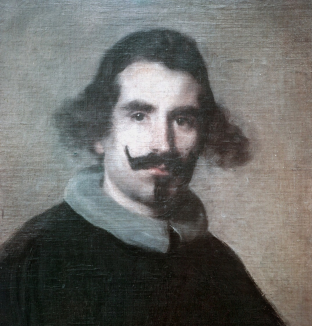 Velázquez, Diego Rodríguez de Silva y, Selbstbildnis, um 1630, Rom, Musei Capitolini